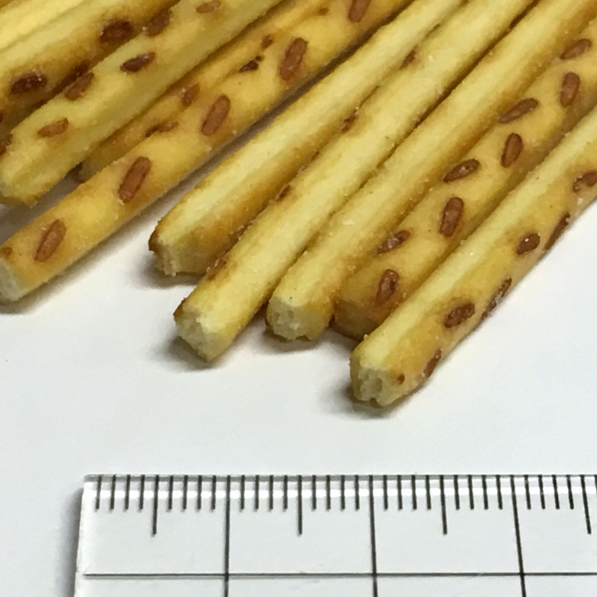 江崎グリコのプリッツ。定規はセンチ尺。